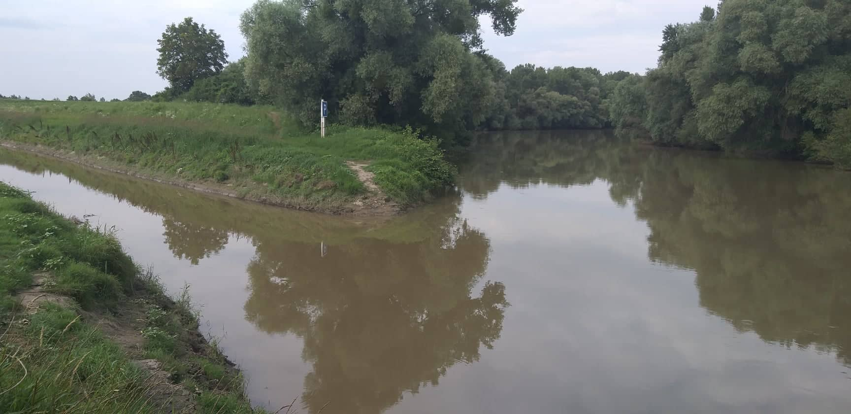 A Ronyva torkolata a Bodrogba, országhatár